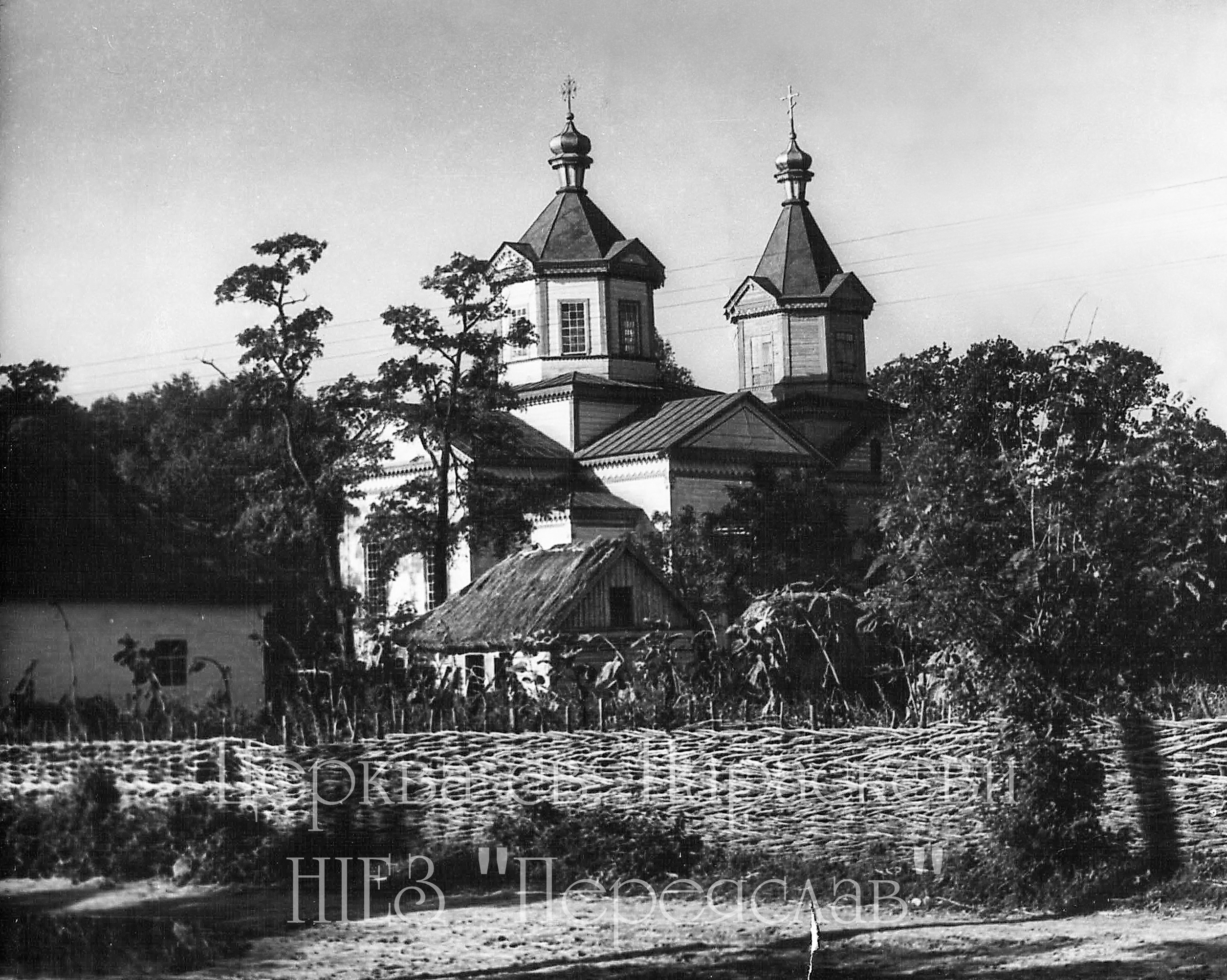 4. Краєвид с. В’юнище з церквою св. Параскеви. 60-ті рр. ХХ ст., Церква св. Параскеви з с. В’юнище